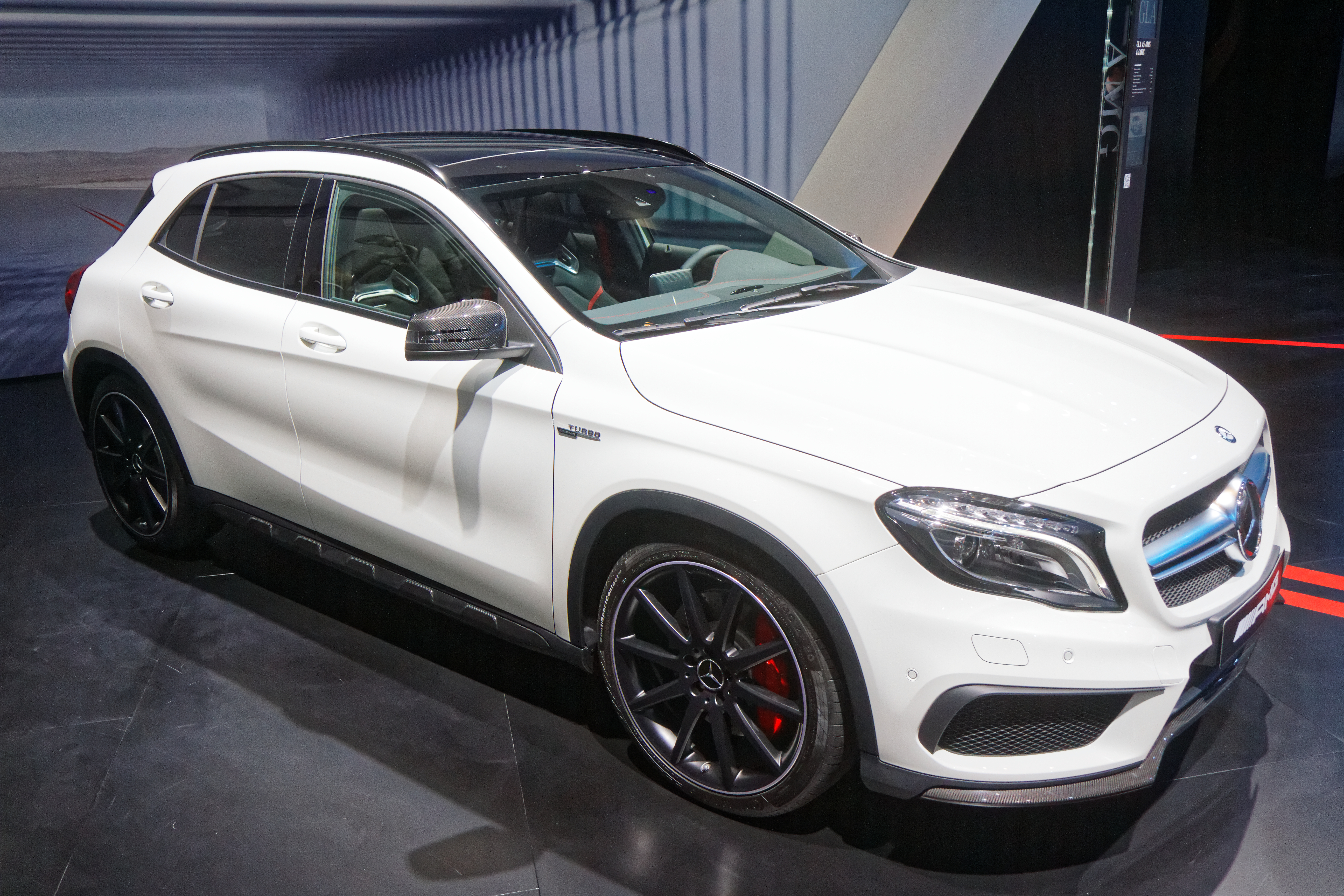 Une GLA 45 AMG 4matic présentée lors du mondial de l'automobile de Paris 2014.